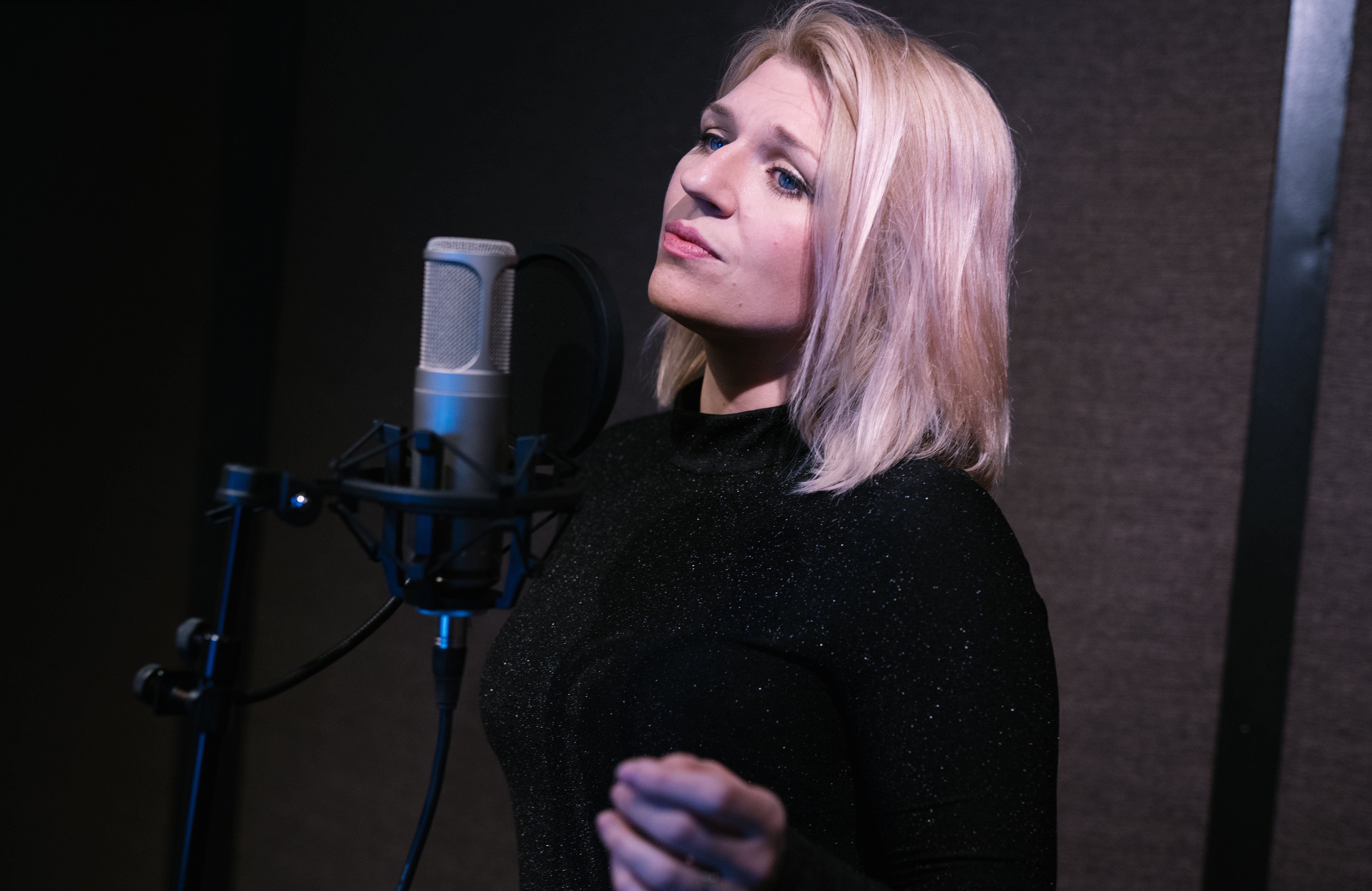 Valokuva livestudiosessiosta keväällä 2019. Regina Launivuo ja Jukka Åkermanin duettosessio.